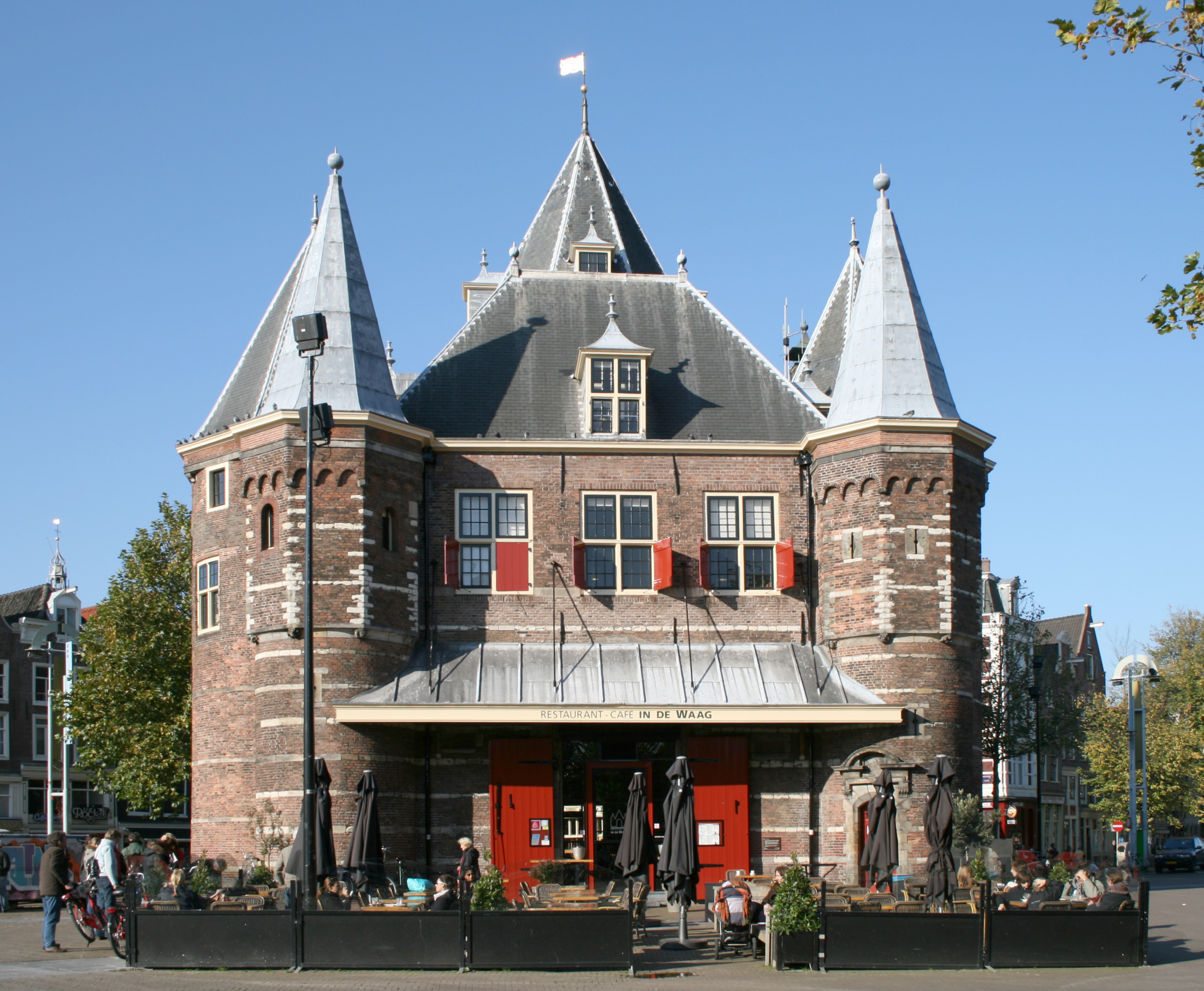 The Waag on Nieuwmarkt square in Amsterdam.